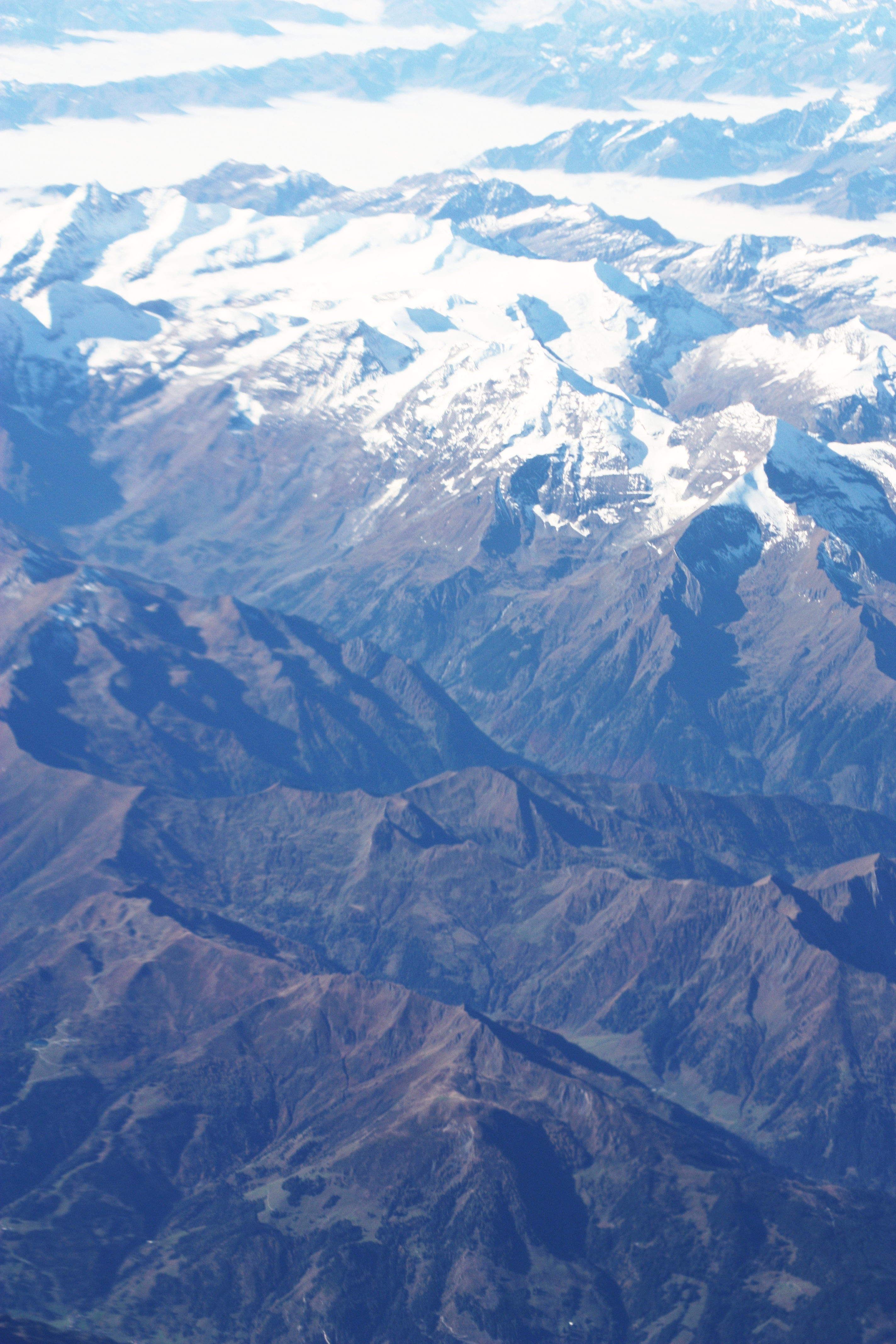 1 Flug von Frankfurt/Main nach Sofia; Start 10:12 MEZ; Landung 13:06 MEZ; Oktober 2010: Glocknergruppe von Nordosten